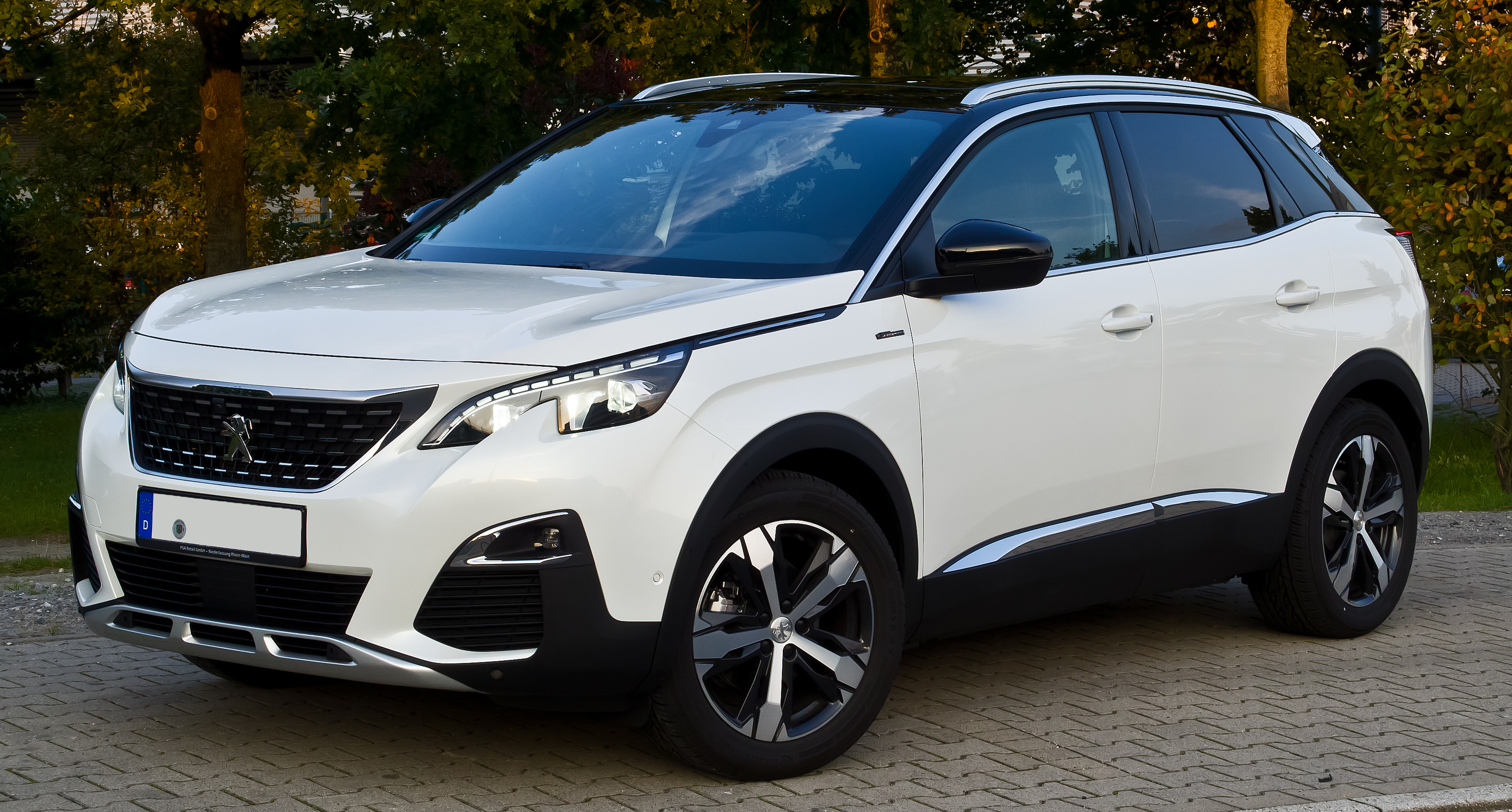 Peugeot 3008 THP 165 EAT6 Allure GT-Line (II)